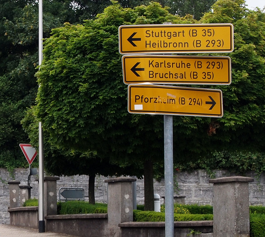 Wegweiser mit Hinweisen auf die Bundesstraßen